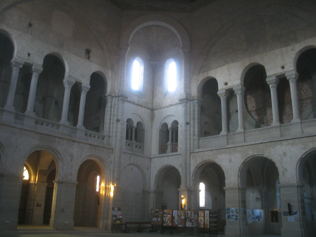 Monastère de Prouille : vue intérieure